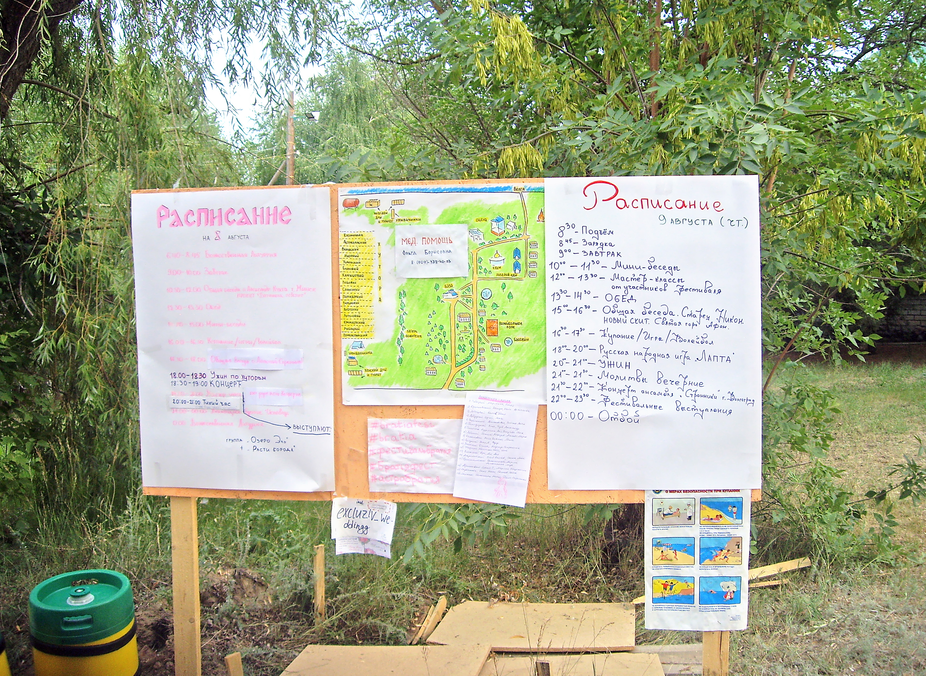 Расписание на 8 и 9 июля, то есть на текущий и завтрашний день